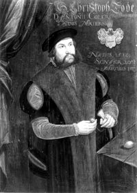 Porträt des Lübecker Bürgermeister Christoph Tode